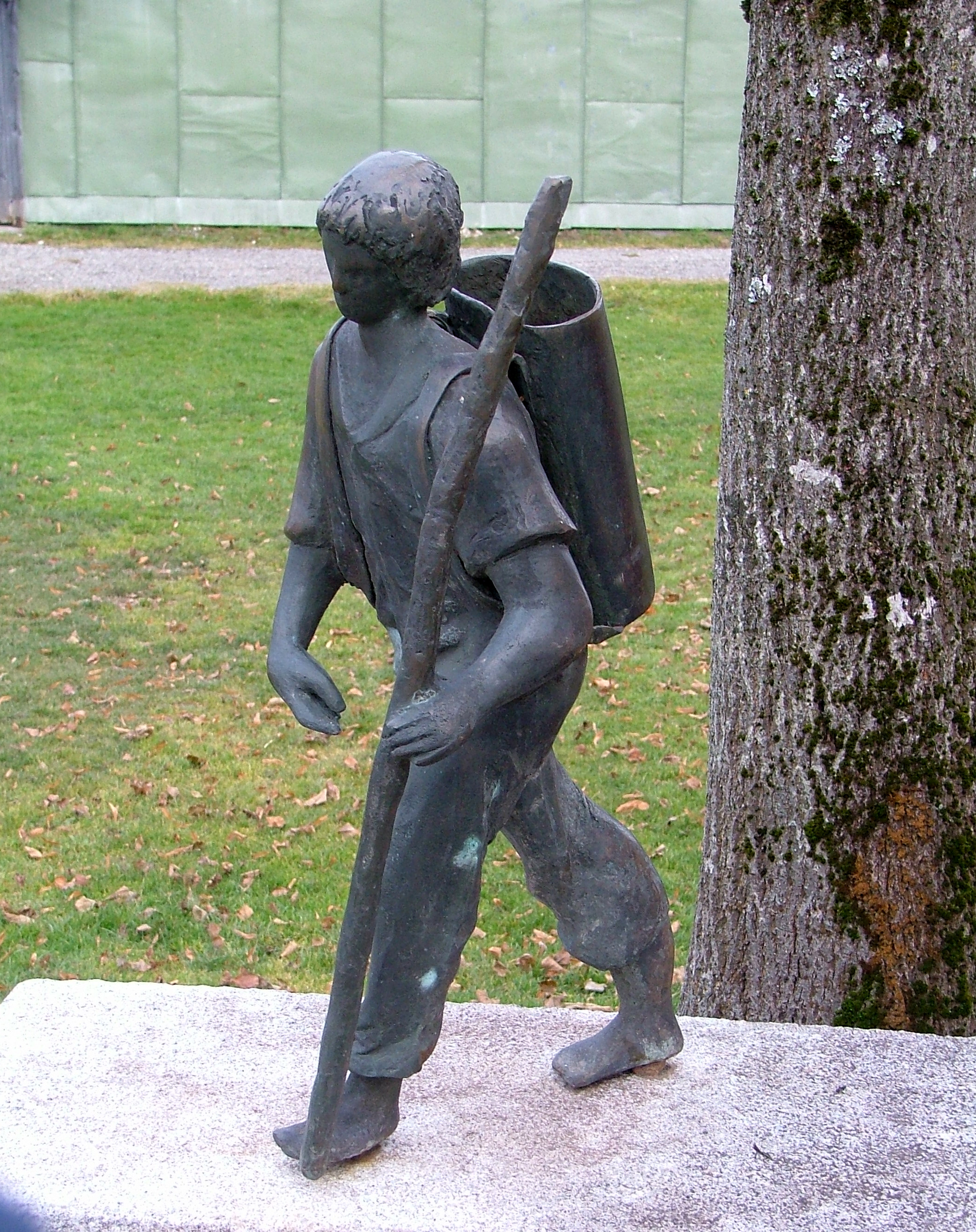 Knottenried